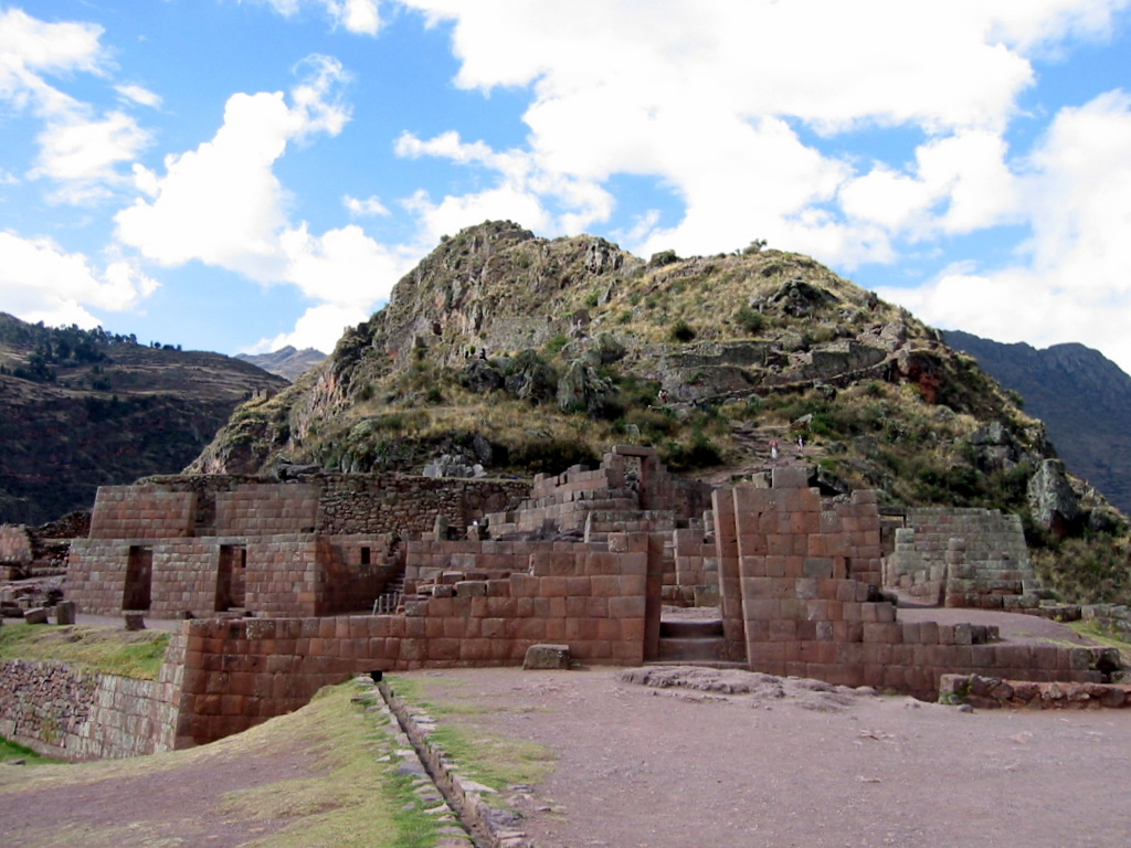 Inca ruins near Pisac, Peru